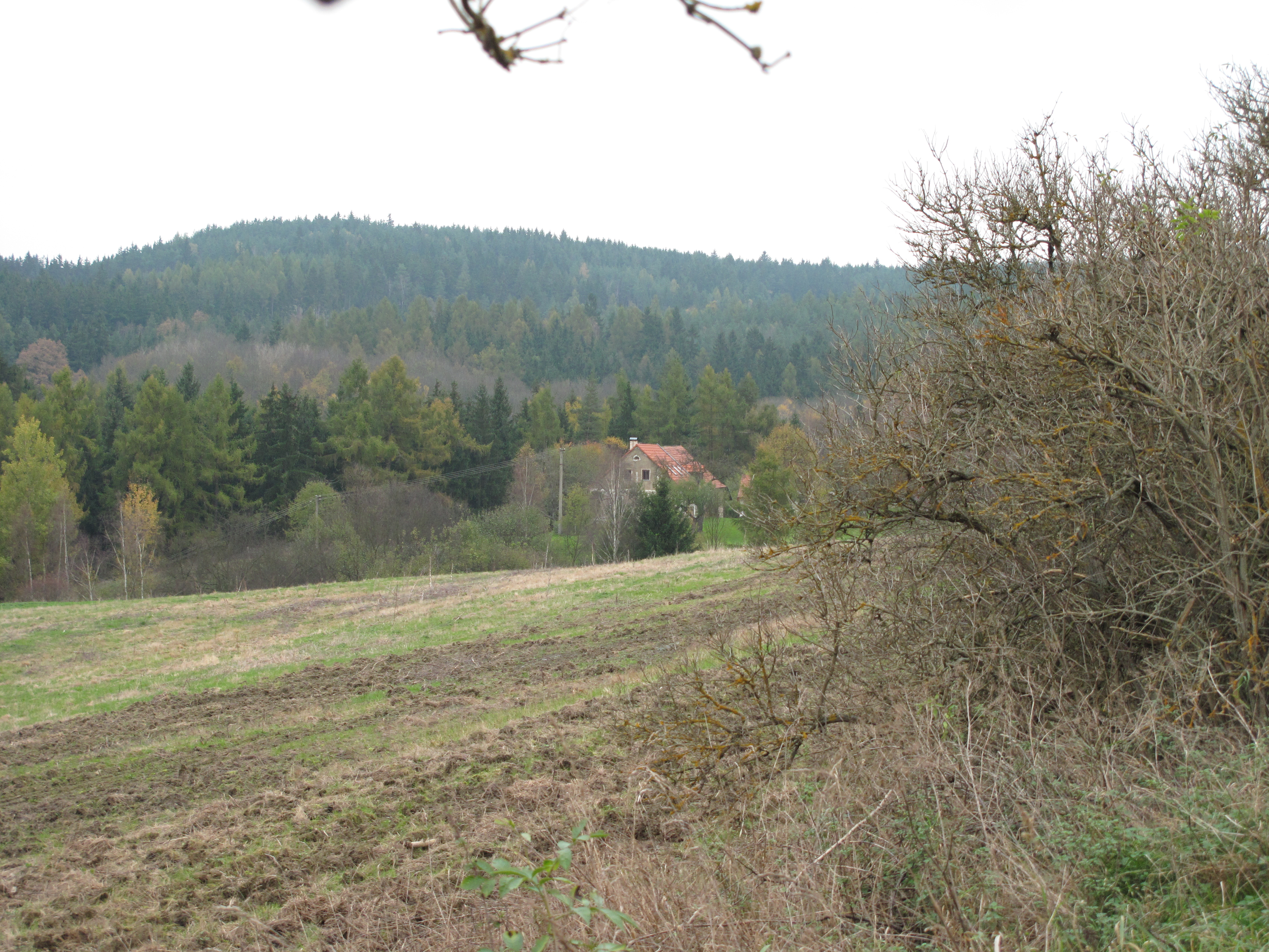 Pohled na barák v Číhání. Okres Karlovy Vary, Česká republika.